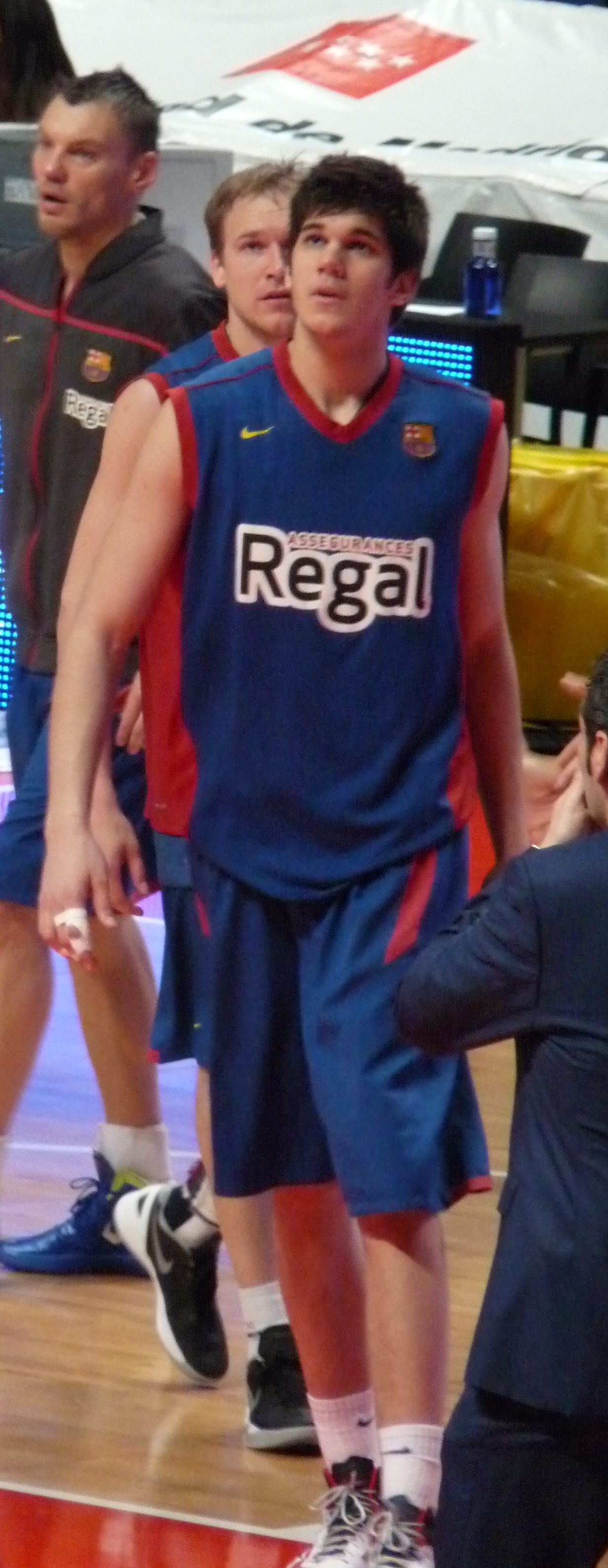 Marko Todorović